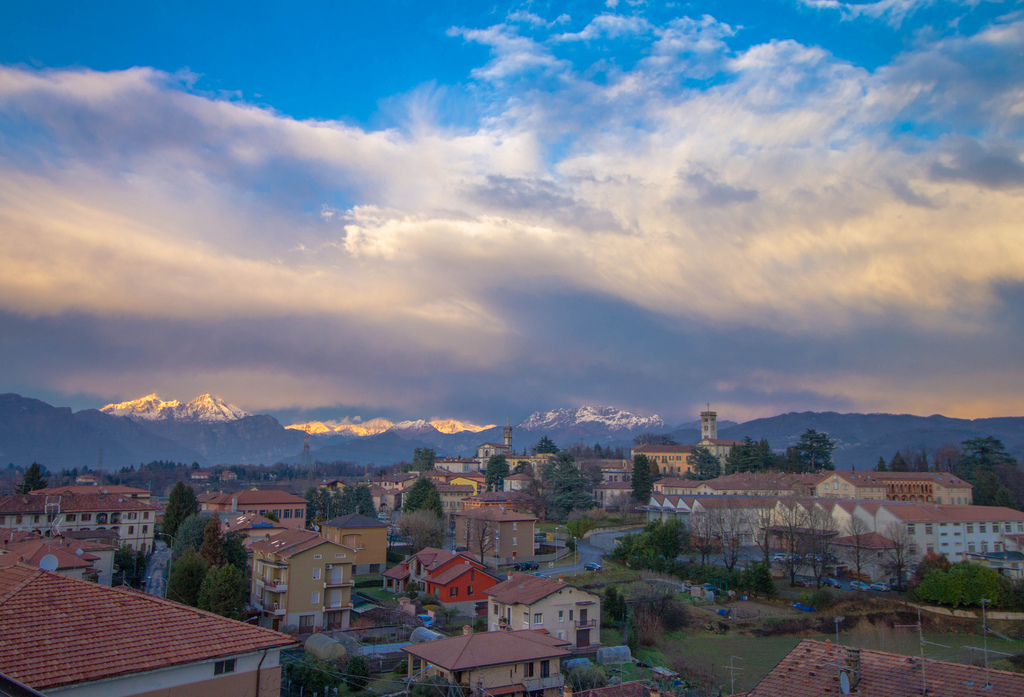 Panorama Cremella